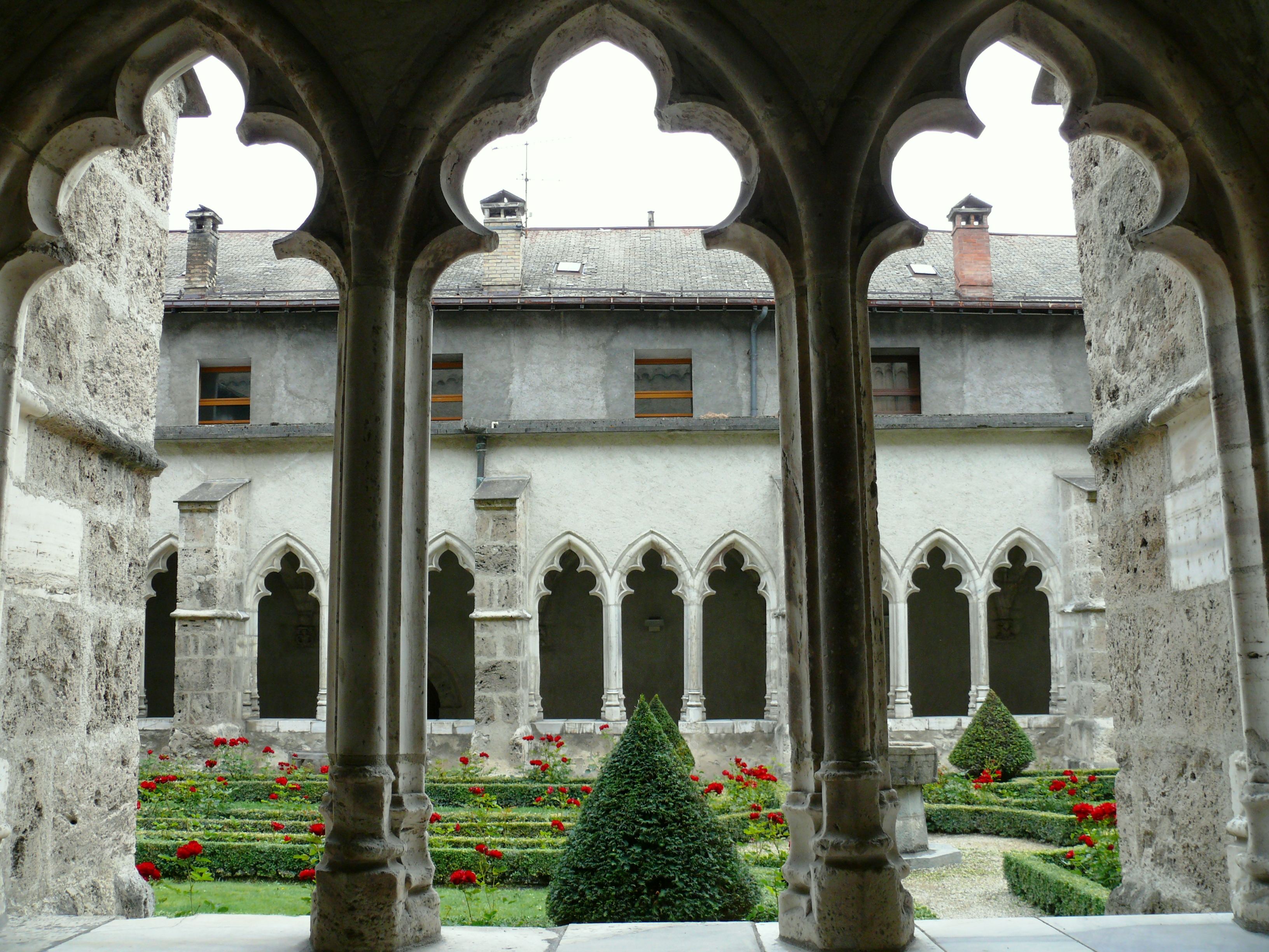 Cathédrale Saint-Jean-Baptiste de Saint-Jean-de-Maurienne - Cloître